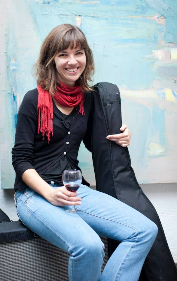 Susana Garrido Pombo en una prestigiosa galería de arte